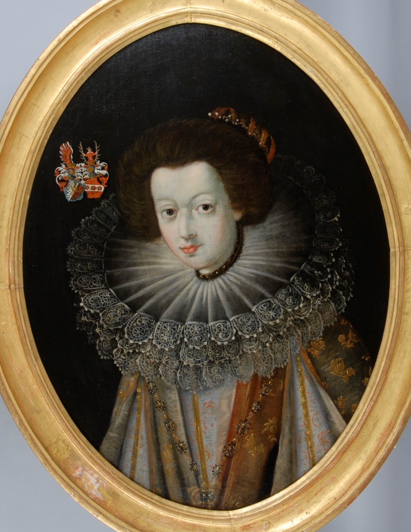 Anna Kateřina Krakowská z Kolowrat, rozená Rozdražovská z Rozdražova (manželka Viléma Albrechta Krakowského z Kolowrat)